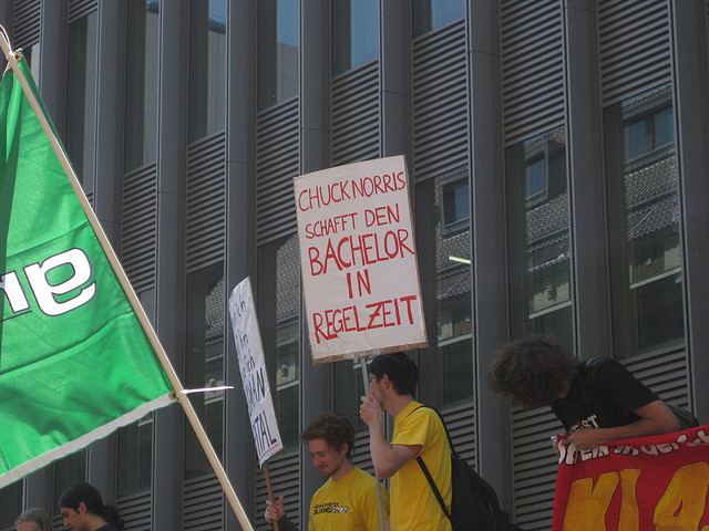 Bildungsstreik Demo Berlin #16, Chuck Norris Plakat